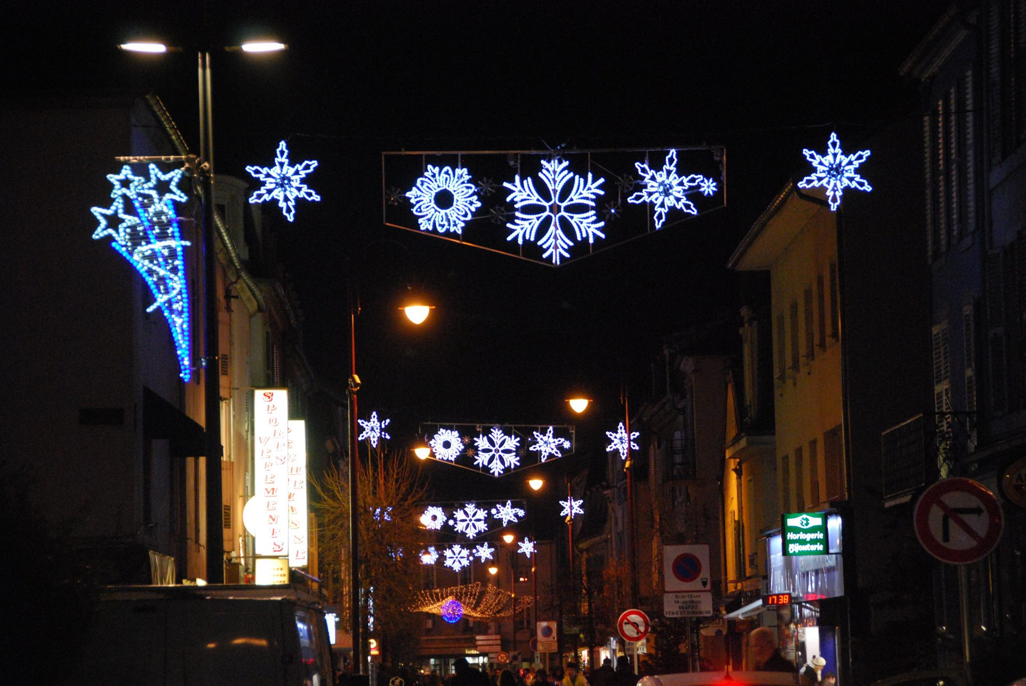 La rue Georges-Genoux de Vesoul (Haute-Saône)